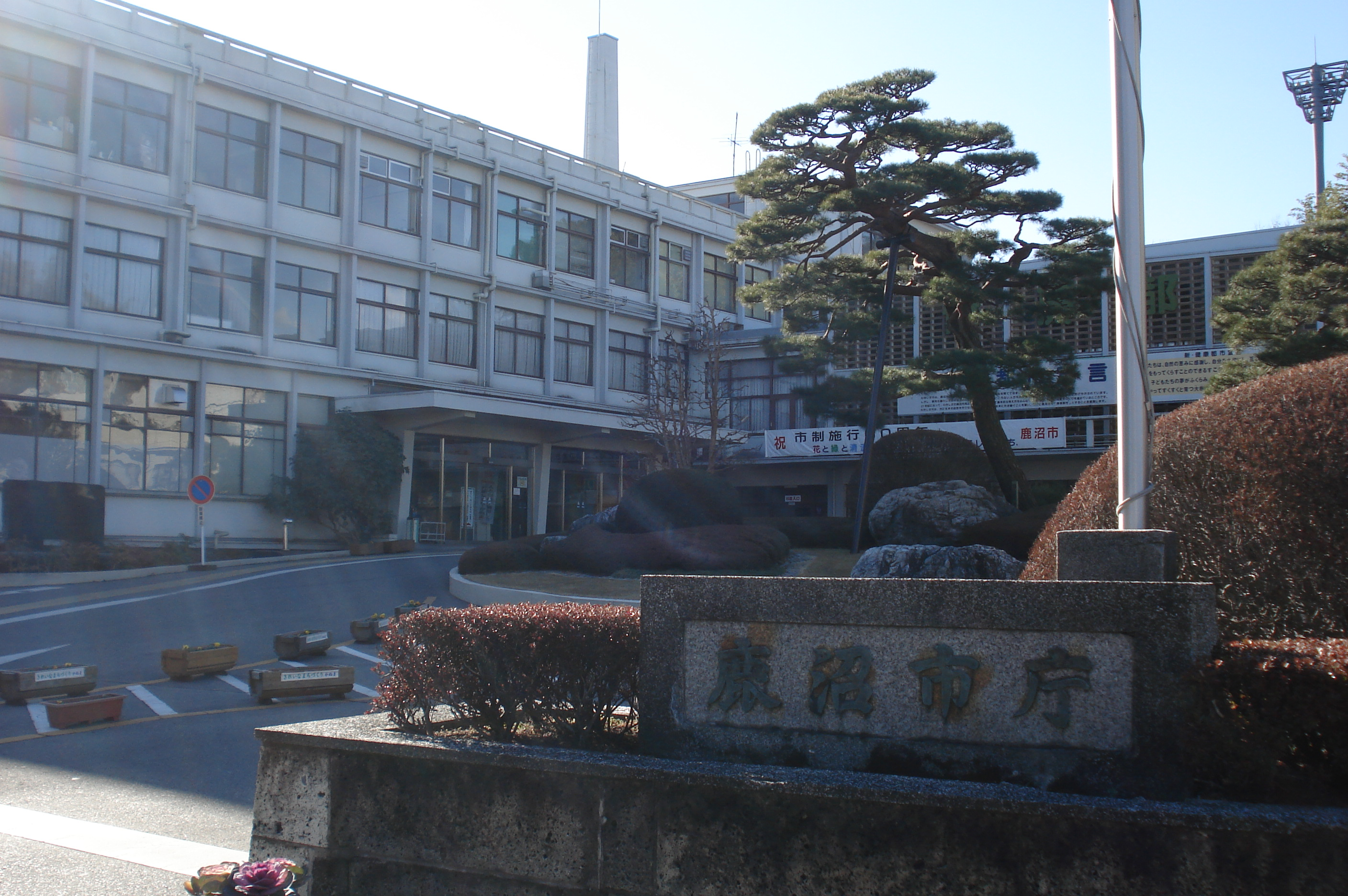 鹿沼市役所 栃木県鹿沼市